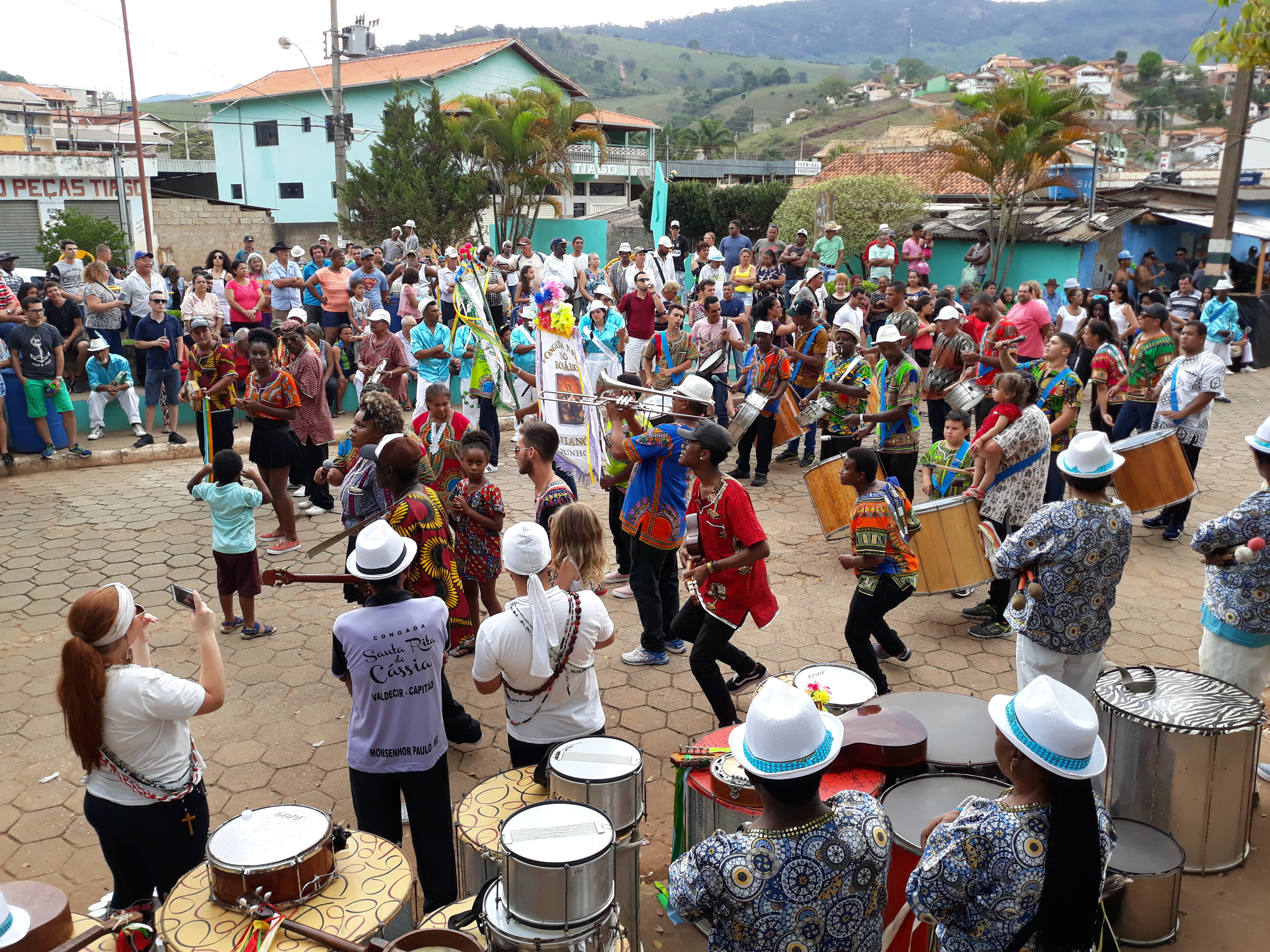 CONGADAS DE SILVIANÓPOLIS